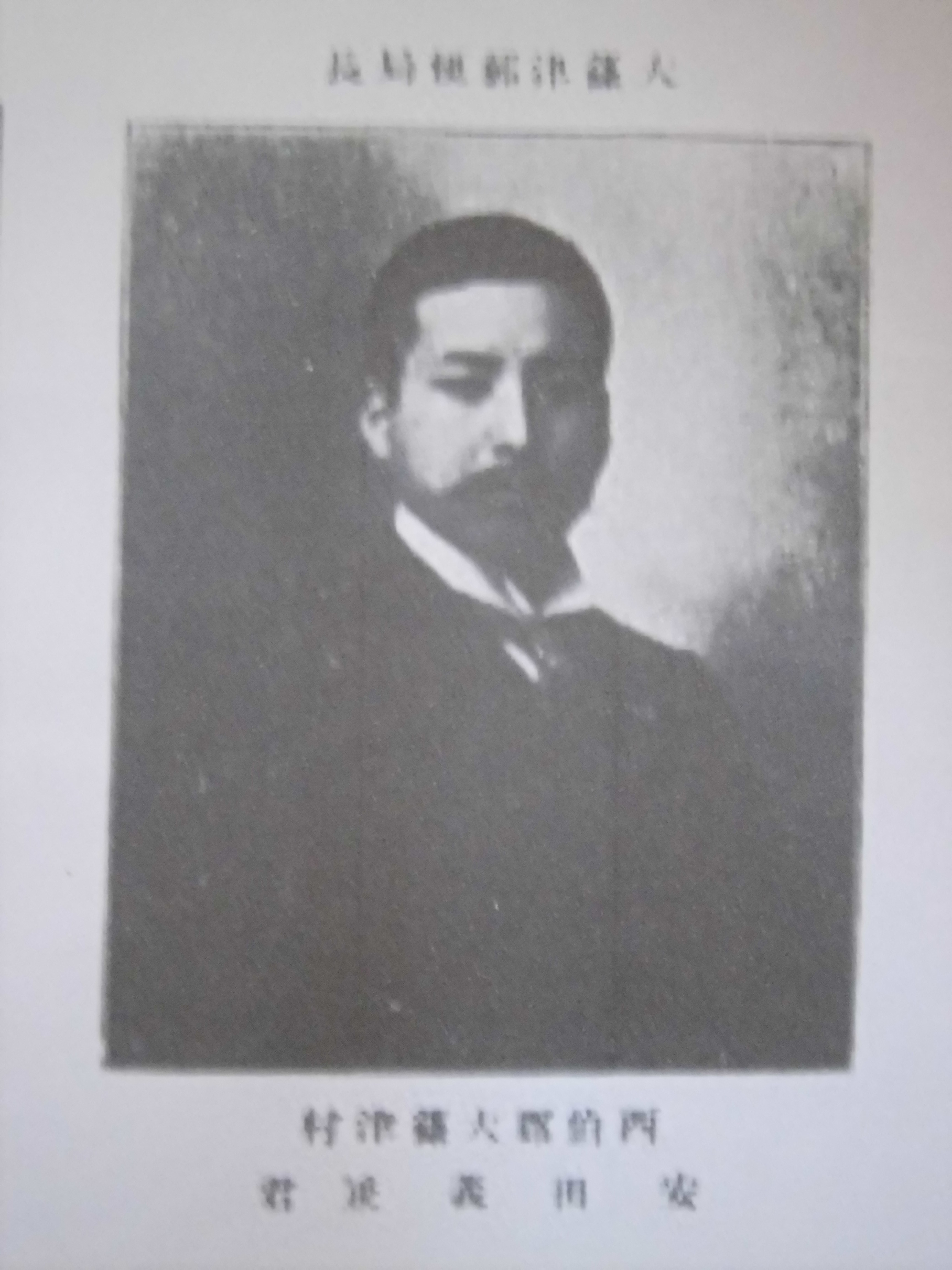 安田義兼（Yasuda Yoshikane）